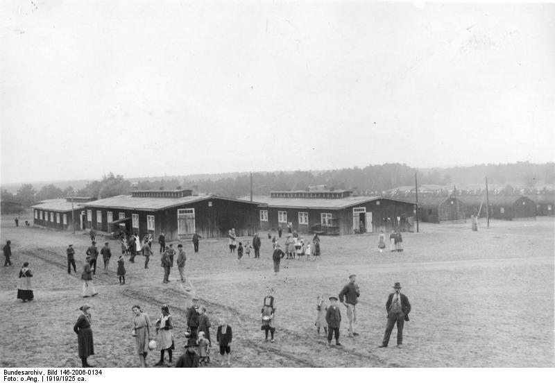 Heimkehrerlager für Flüchtlinge in Zossen Zur vorläufigen Unterbringung der über die Grenze flüchtenden ziellosen Familien und ziellosen ledigen weiblichen Personen sind unter anderem auch in Zossen bei Berlin, Heimkehrerlager eingerichtet worden. Auch ziellose männliche Personen finden dort Aufnahme, wenn sie infolge hohen Altes oder Krankheit arbeitsunfähig sind. Unsere Aufnahmen zeigen das Leben und Treiben in dem Heimkehrlager Zossen. Blick auf das Heimkehrlager Zossen. [Anfang der 20.Jahre]